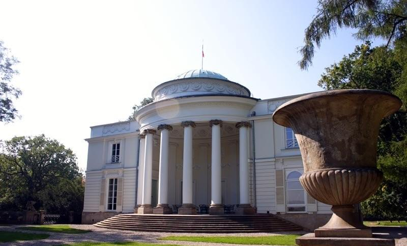 Warszawa (Polska)